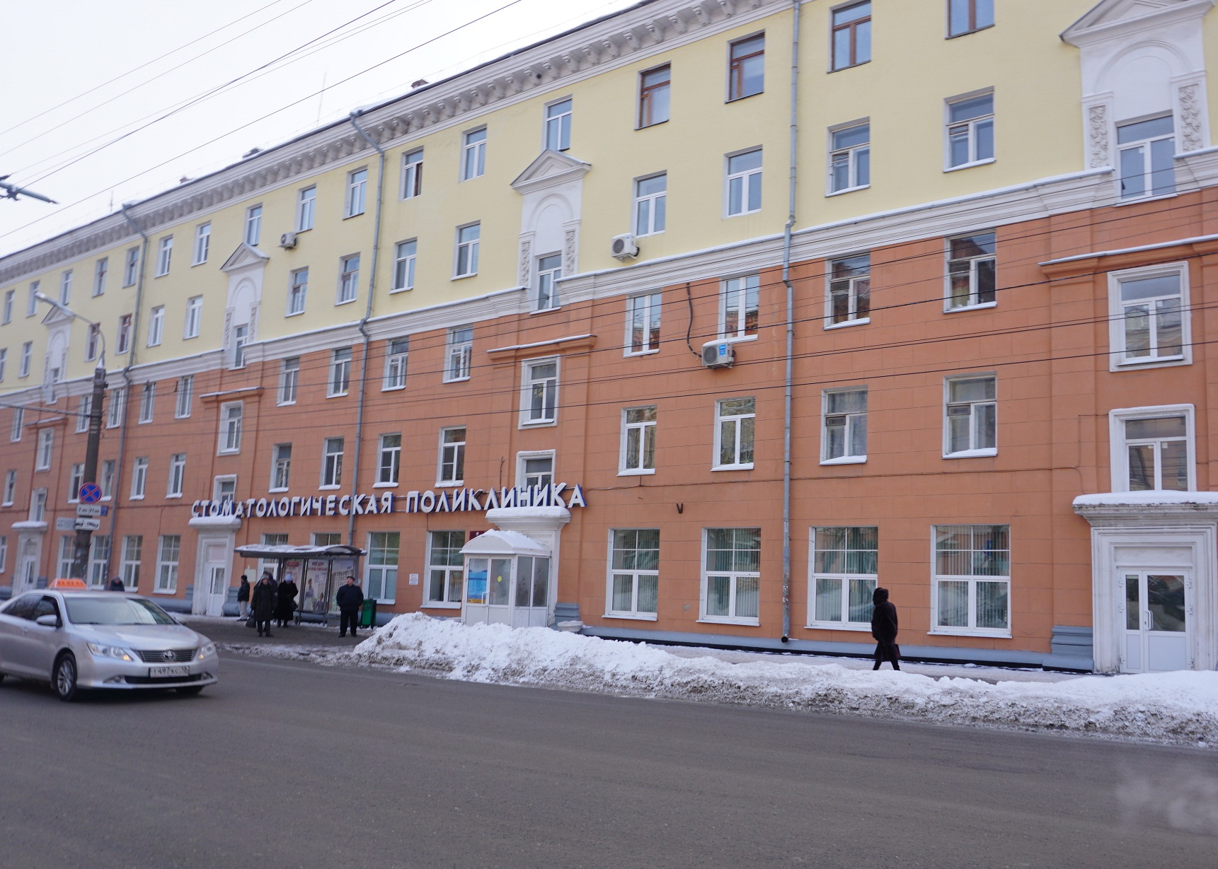 Дом (ул. Советская, д. 20), где жил и работал народный писатель Семён Самсонов с 1956 по 1978 г.г.